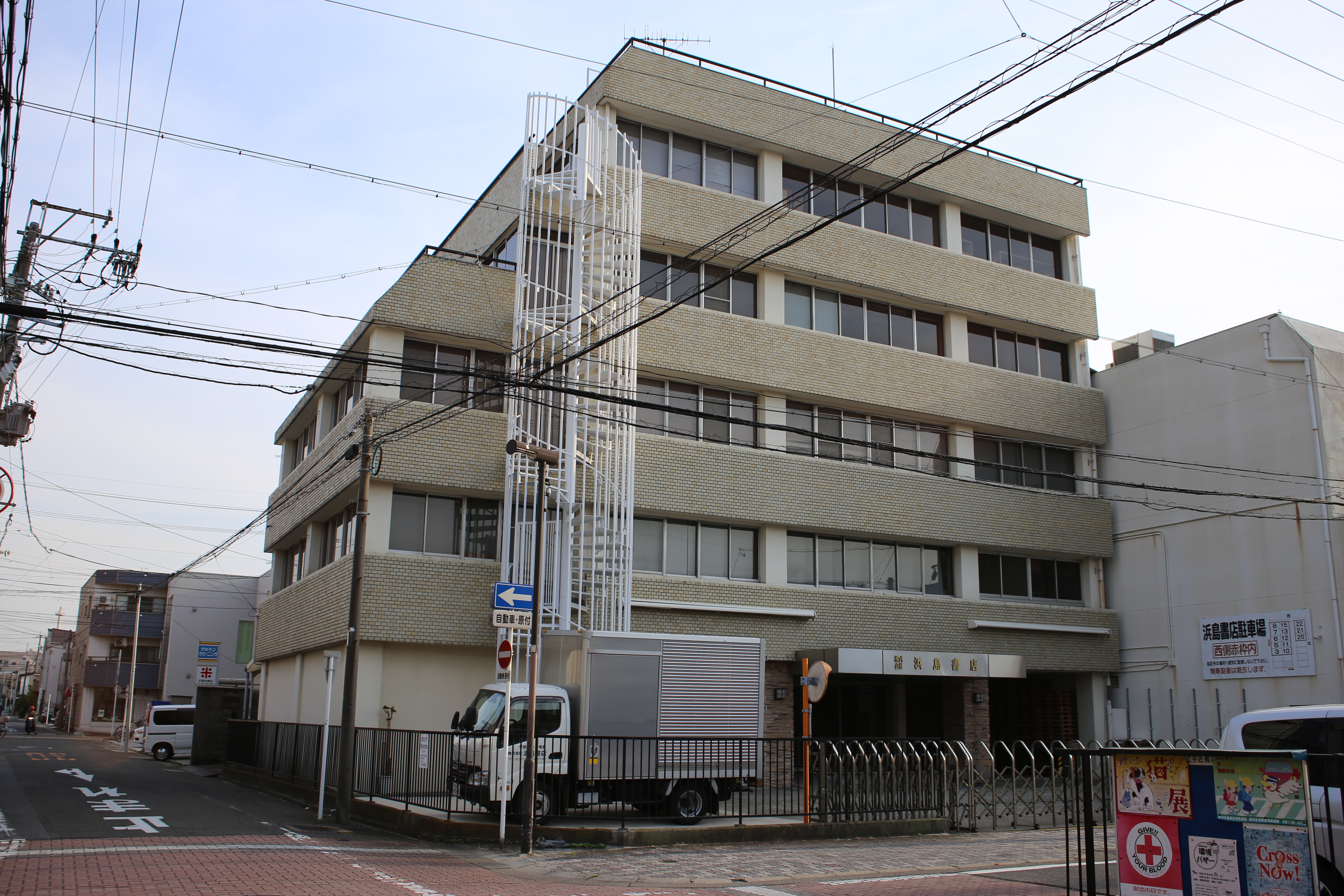 名古屋市昭和区吹上町の浜島書店本社を東側公道北側より撮影